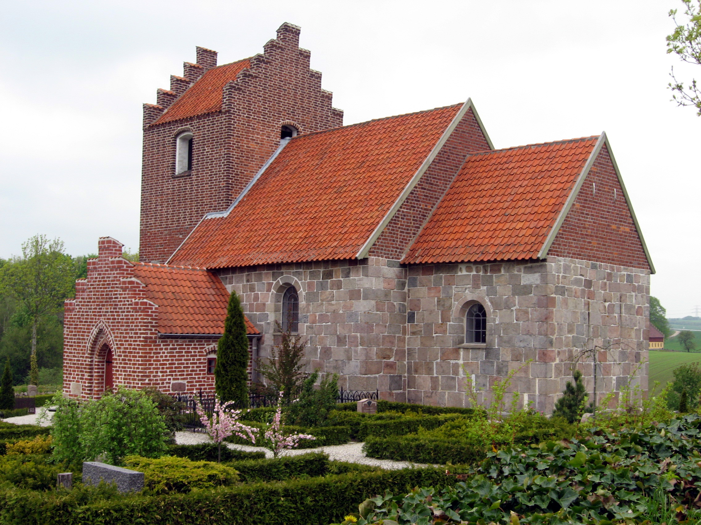 Kasted Kirke in Kasted Sogn, Århus Kommune, Denmark.